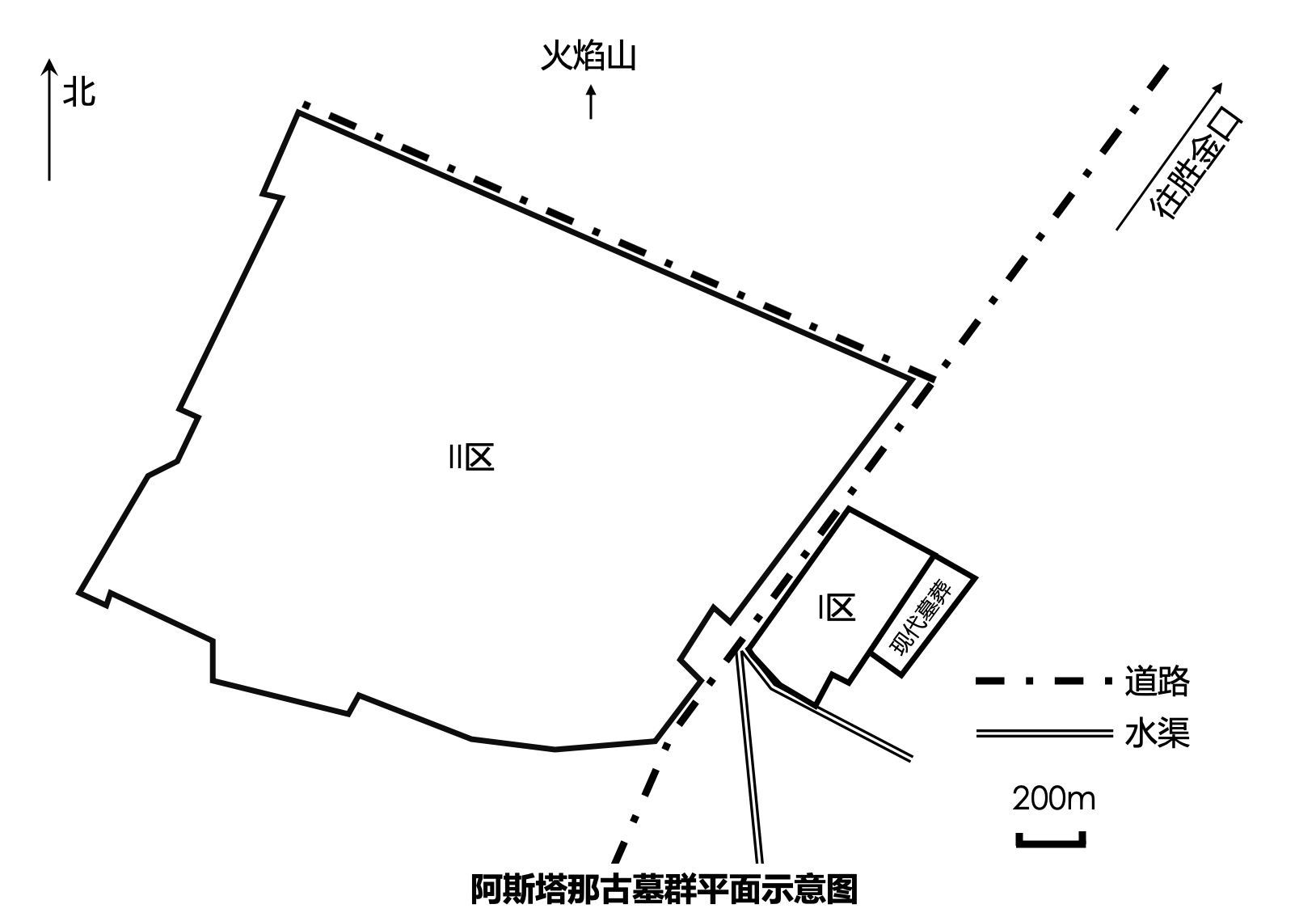 阿斯塔那古墓群平面图，分区信息